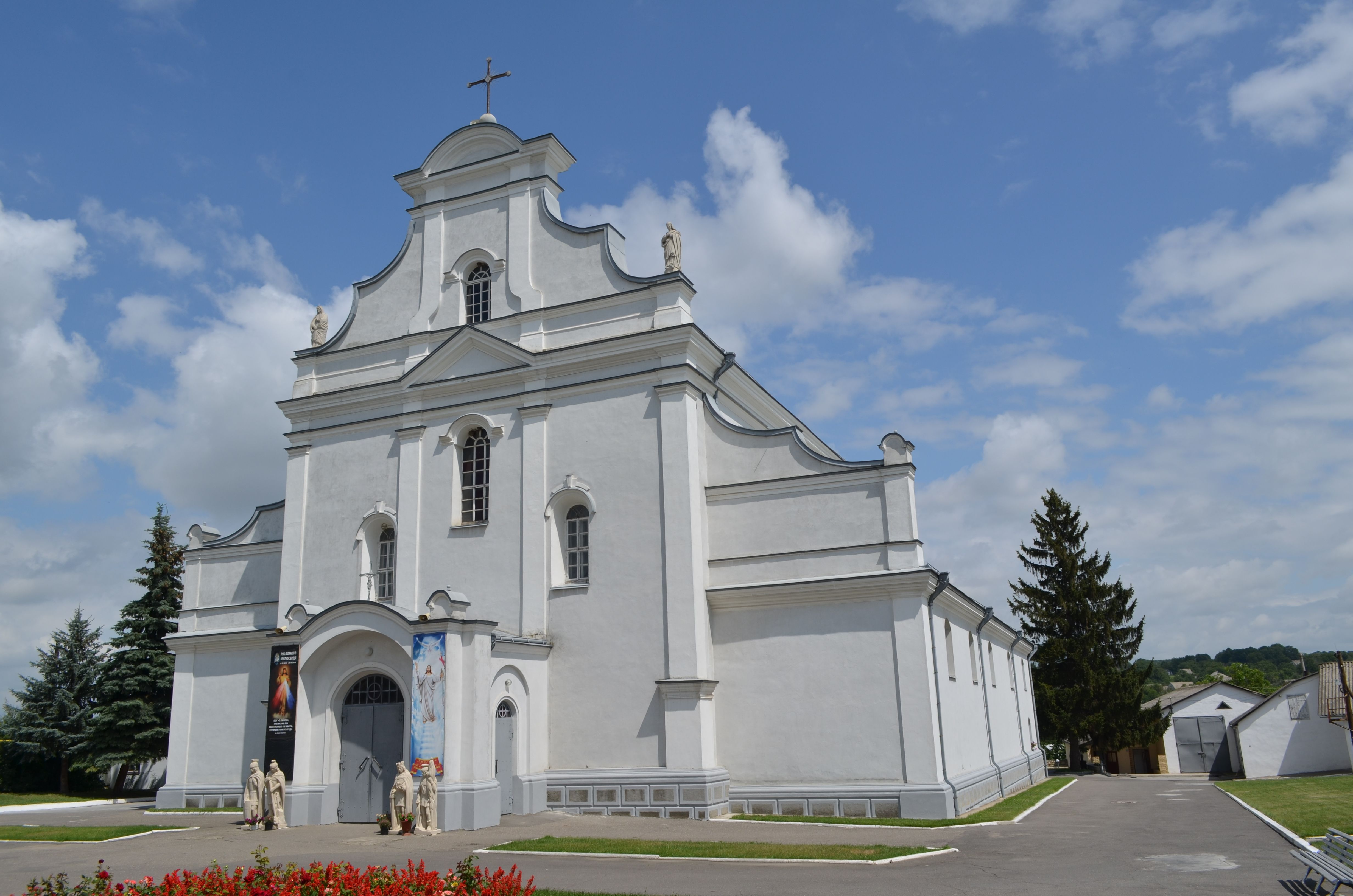 Комплекс костелу Св.Флоріана Шарого (мур.), Шаргород, вул. Леніна,216